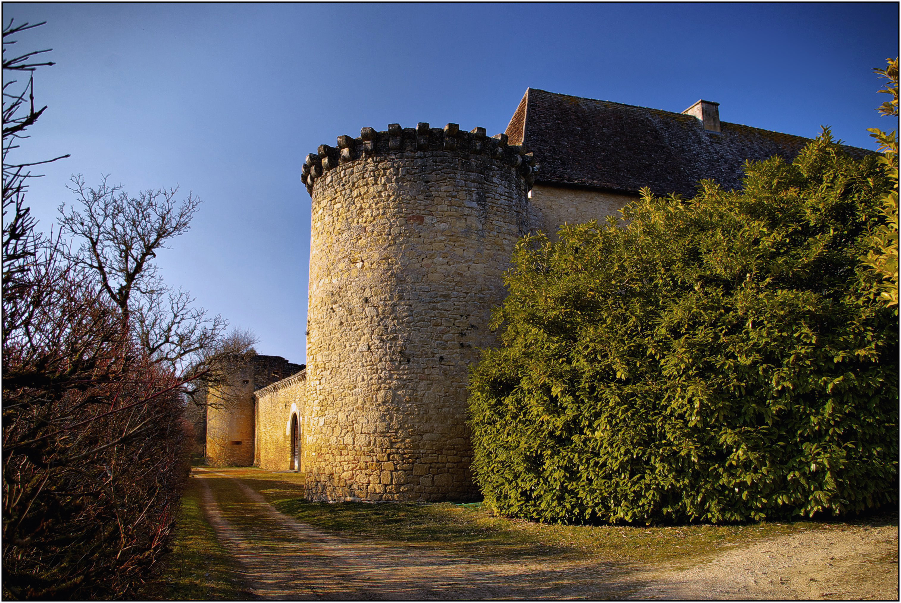 Château d'Auberoche (Inscription), Fanlac